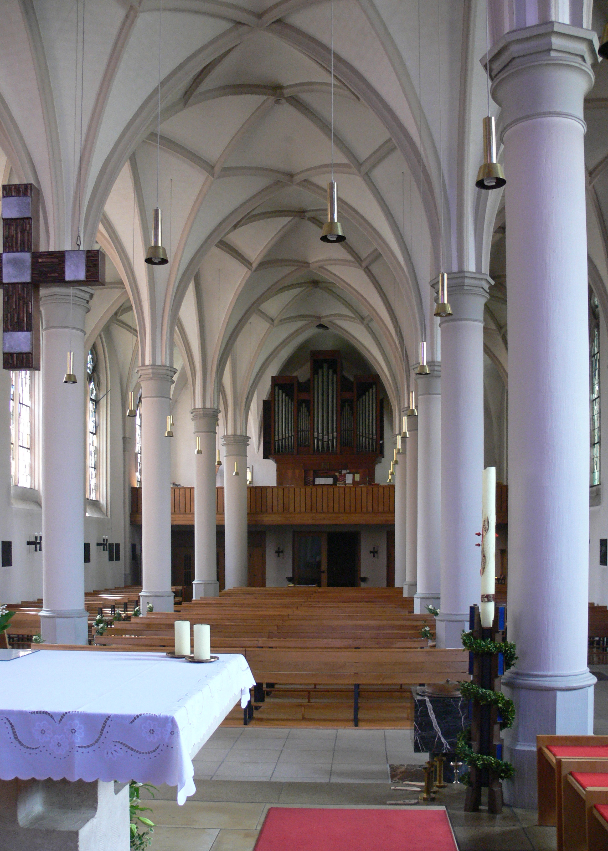 Dessau, Propsteikirche St. Peter und Paul, Blick zur Empore